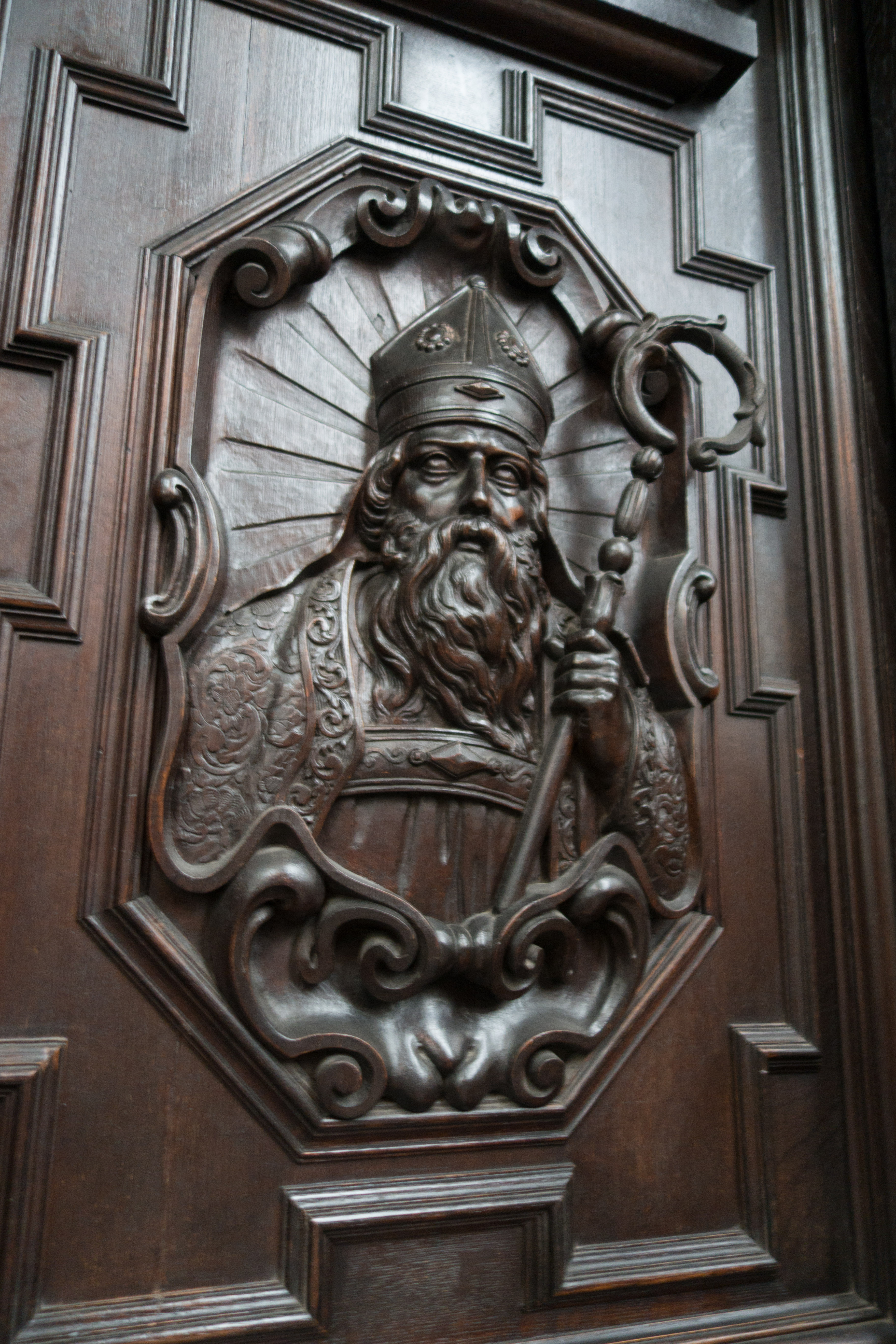 Belgium